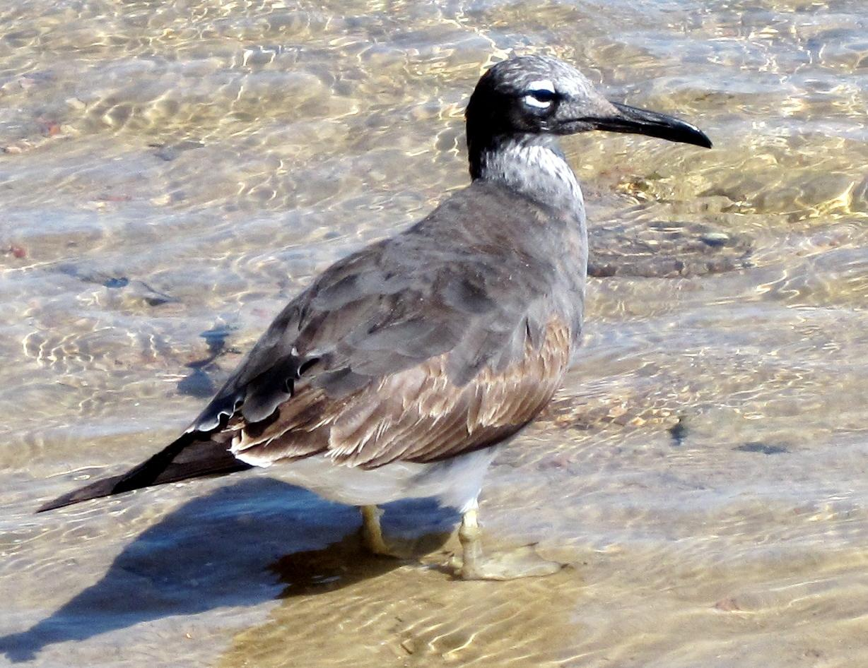 Junge Weißaugenmöwe (Ichthyaetus leucophthalmus) am Ufer des Roten Meeres südlich von Hurghada, Ägypten